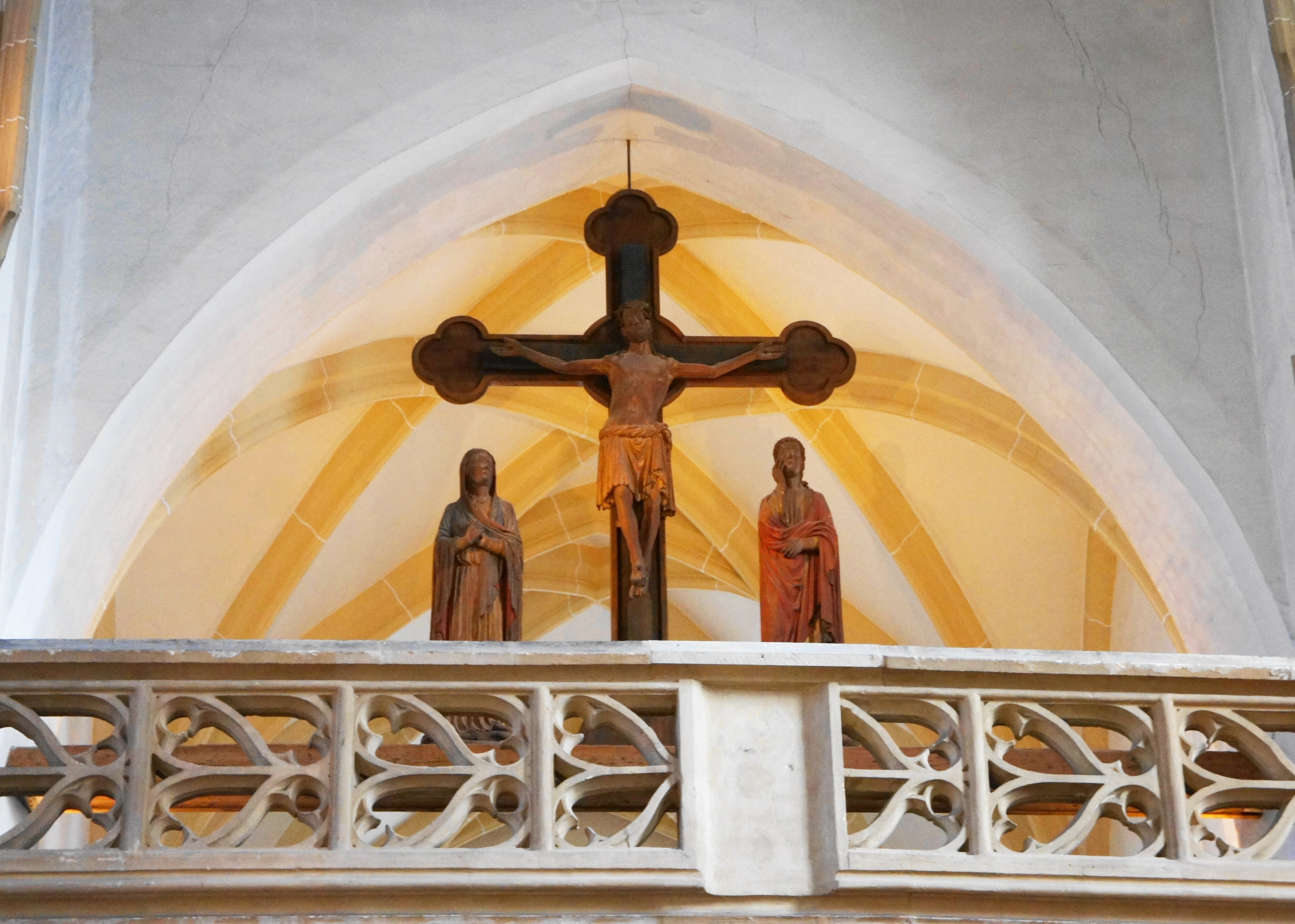 Der Dom zu Freiberg; Triumphkreuzgruppe des spätromanischen Lettners, um 1220/25